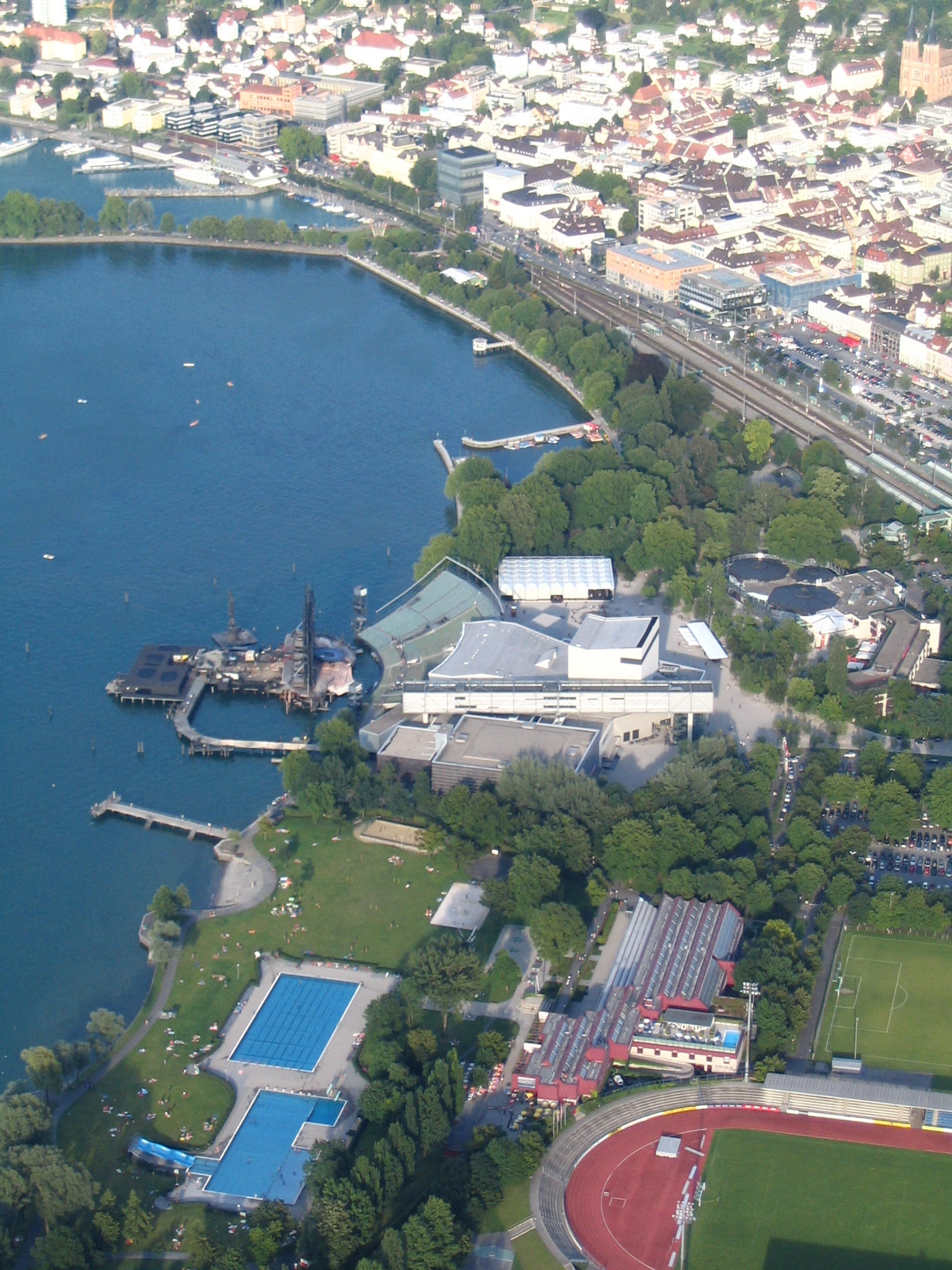 Bregenz, Festspielhaus und Seebühne (Bühnenbild "Tosca"), im Vordergrund das Strand- und Hallenbad Bregenz